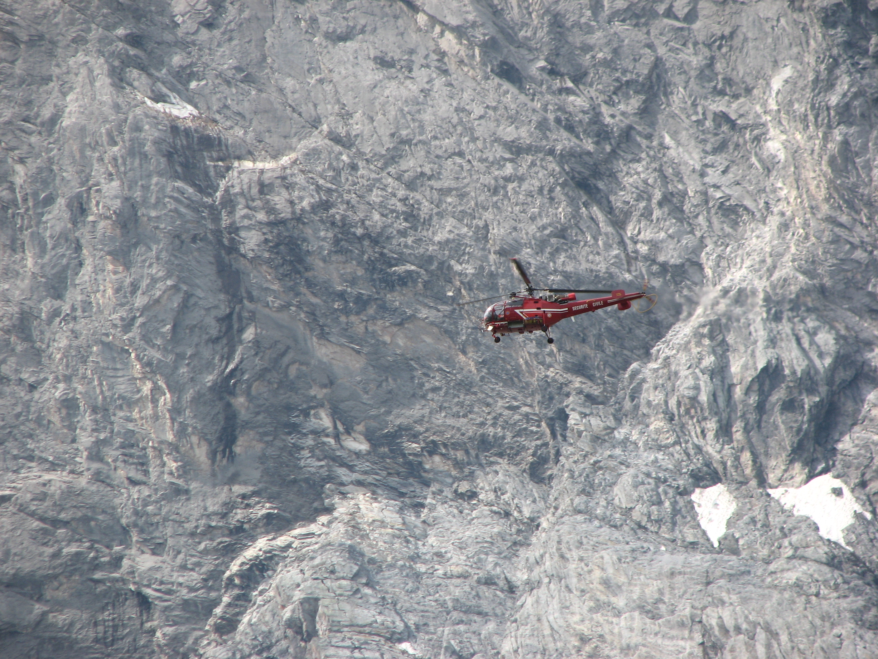 Une alouette de la Sécurité Civile en intervention dans le massif de la Vanoise